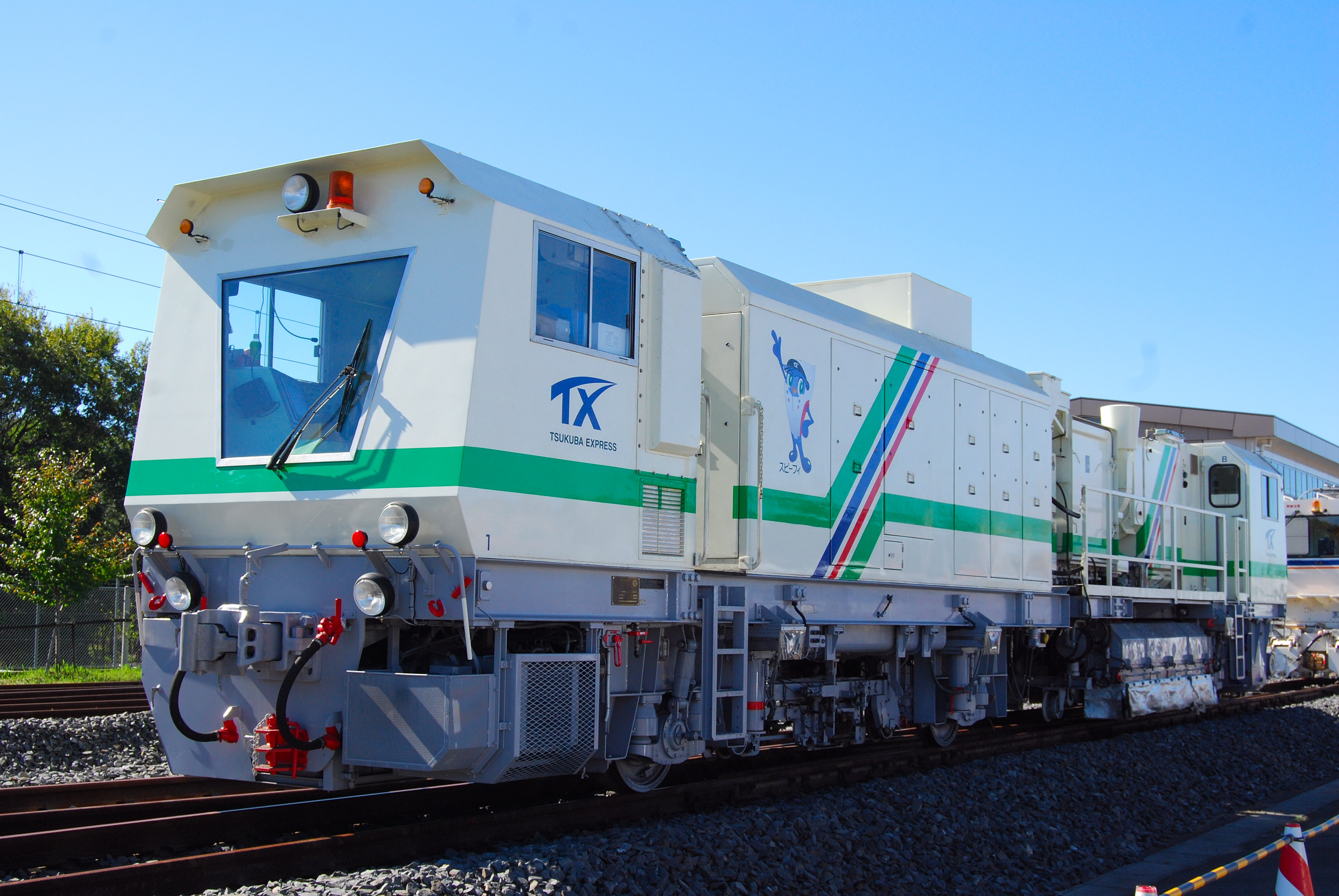 首都圏新都市鉄道のレール削正車（つくばエキスプレス総合基地まつりでの 車両基地開放にて撮影）